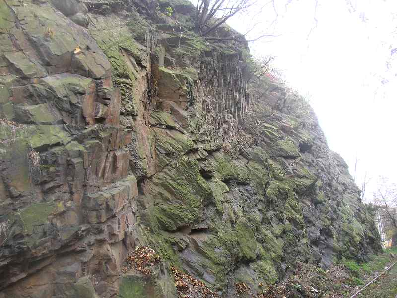 Přírodní památka Pecka v Praze. Zářez zrušené železniční vlečky, ohraničující Pecku z jihozápadní strany.